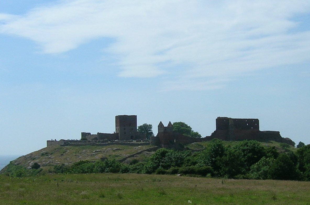 Hammershus - Bornholm - Denmark - 2005